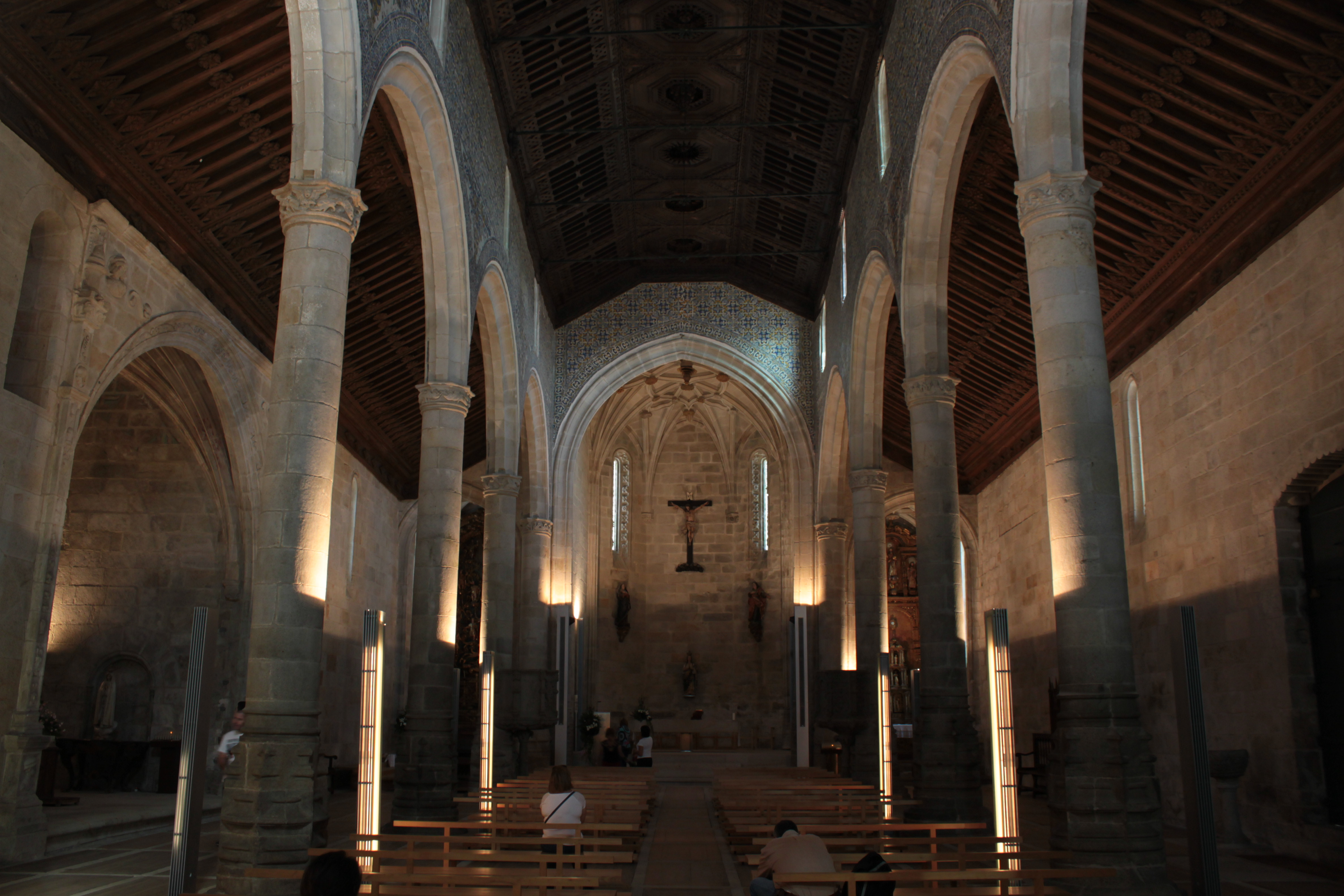 Interior de la iglesia matriz de Nuestra Señora de los Ángeles de Caminha (Portugal).